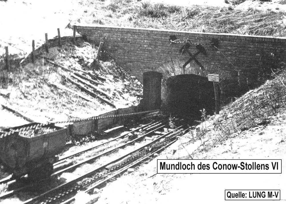 Mundloch des Conow-Stollens VI